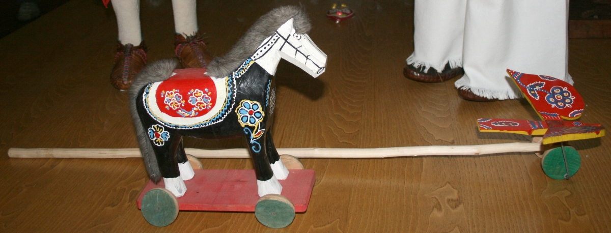 snimljeno tijekom Noći muzeja u Etnografskom muzeju u Zagrebu